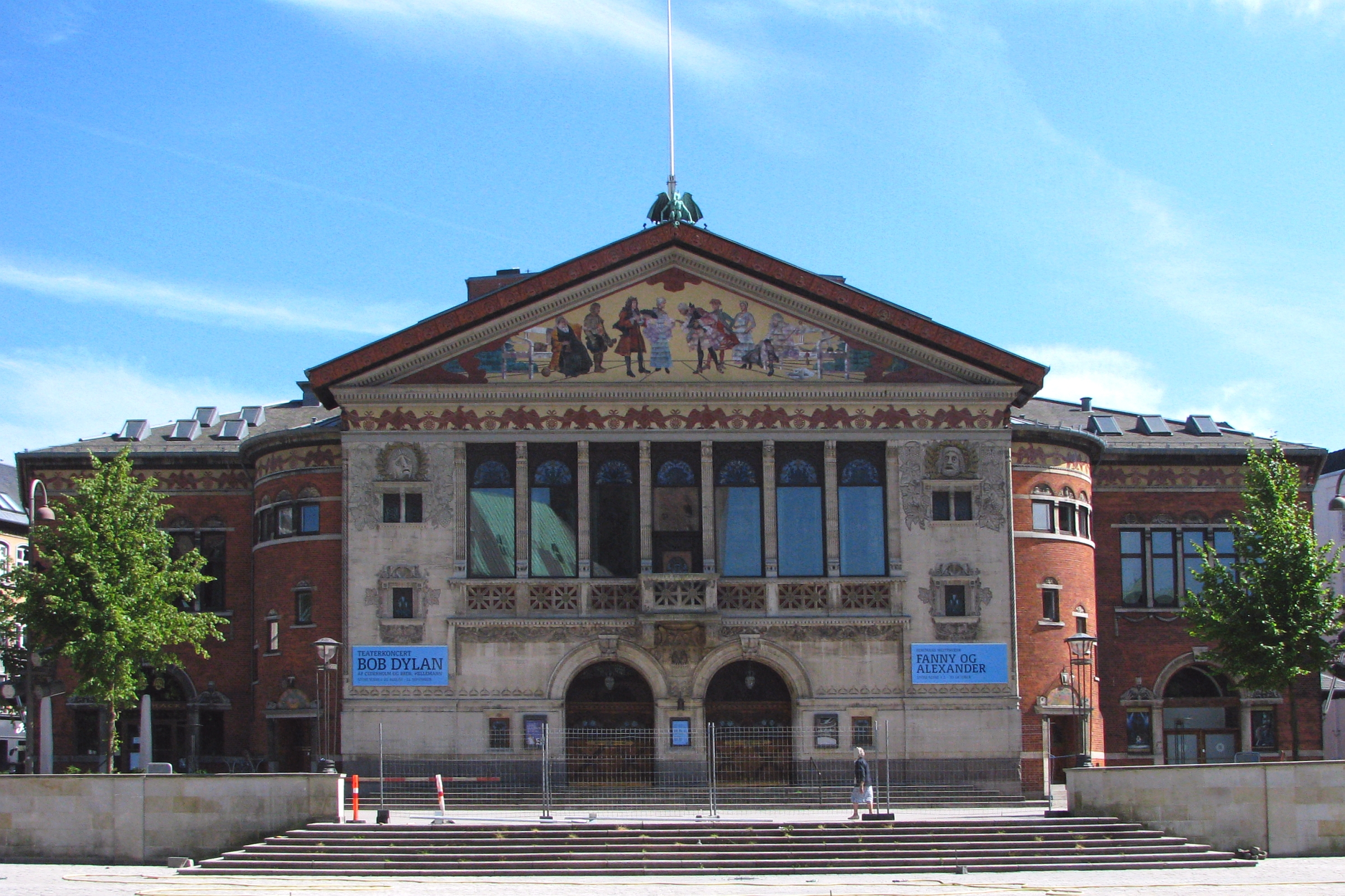 Aarhus Teater Musikhuset (1900) - tegnet af arkitekt H. Kampmann; Danmark - Foto 2010 Wolfgang Pehlemann Steinberg/Ostsee IMG_6492